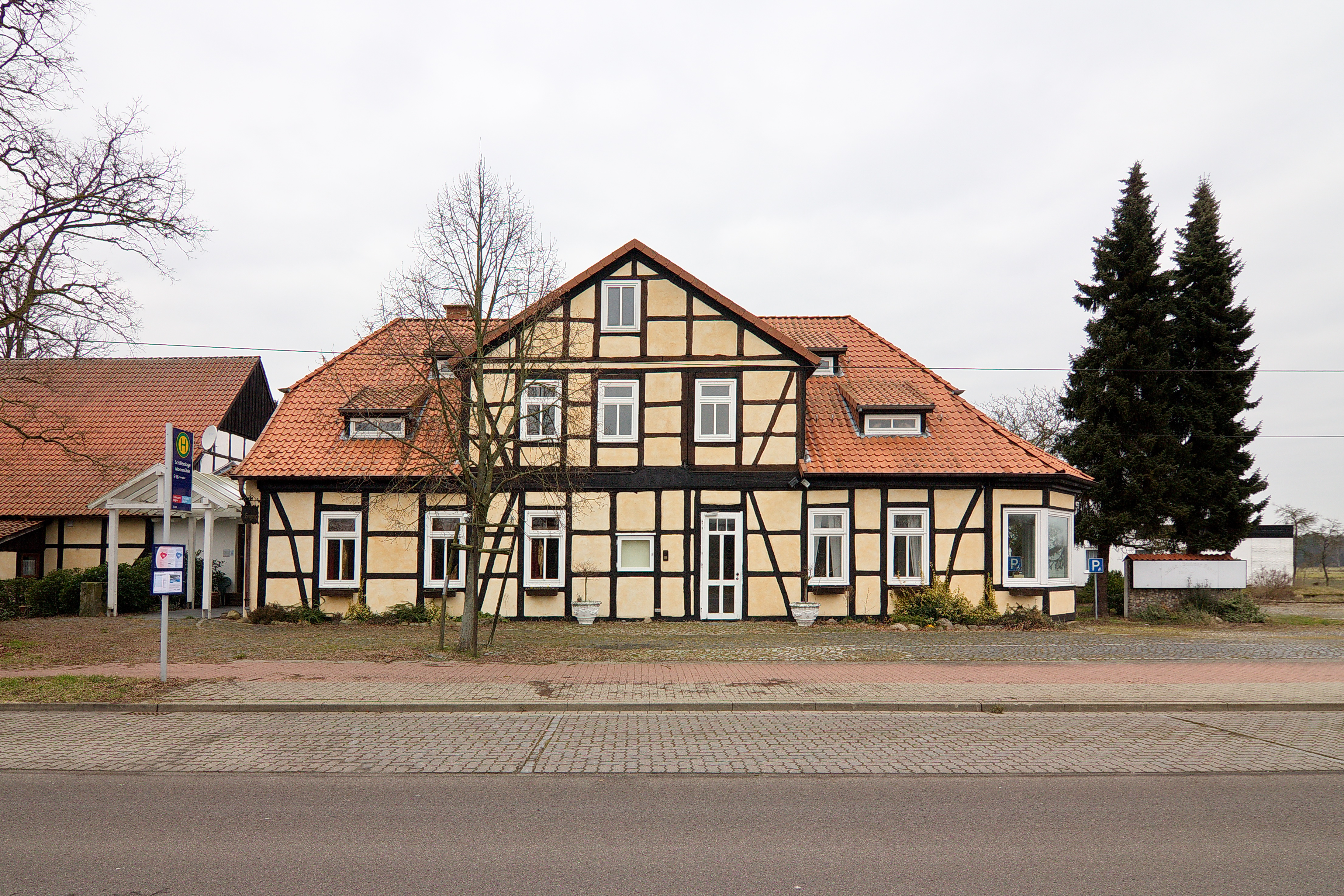 Historische Moormühle von 1777 bei Beinhorn (Burgdorf), Niedersachsen, Deutschland